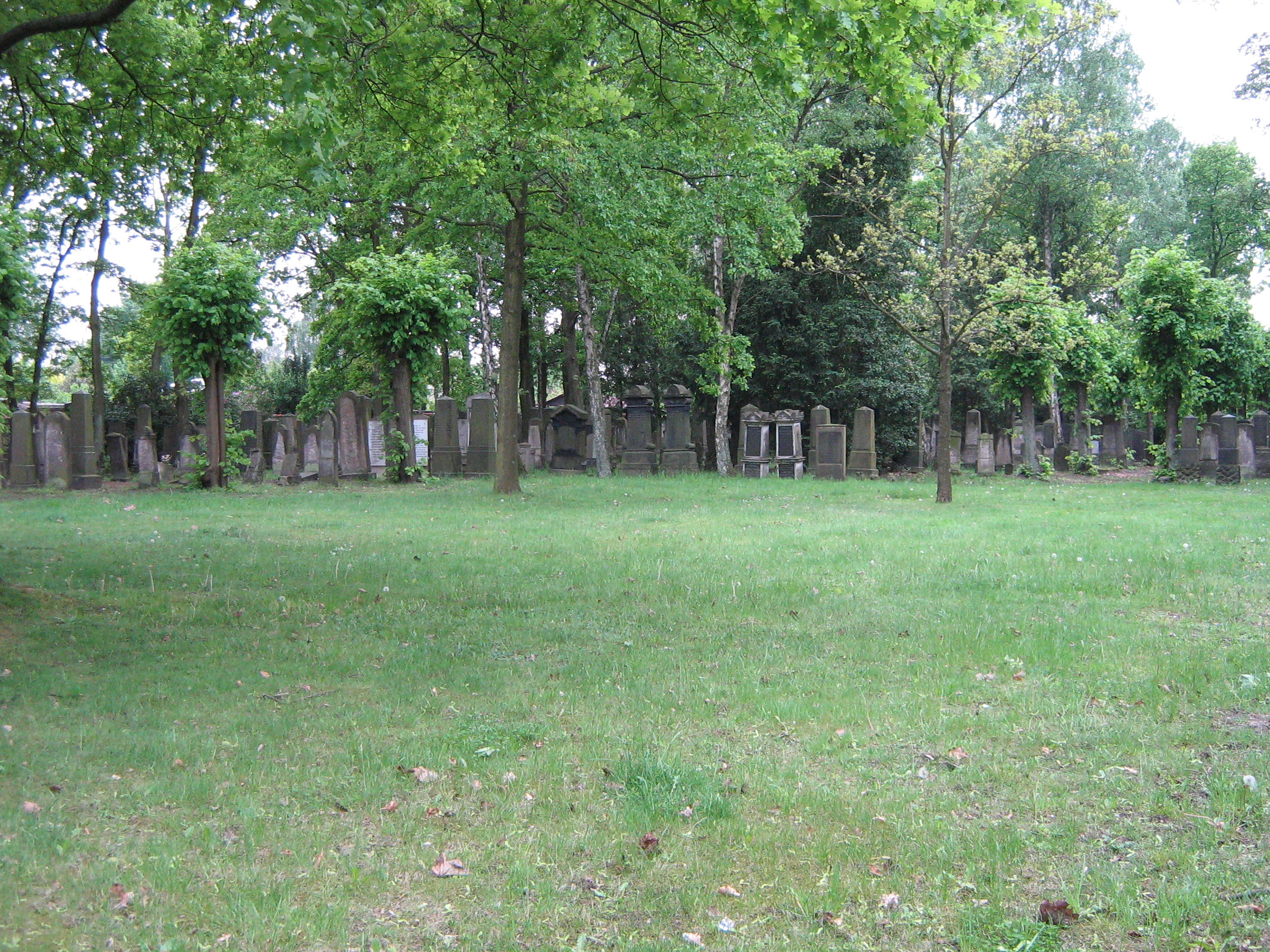 Jüdischer Friedhof Langenfelde (Hamburg-Eimsbüttel)